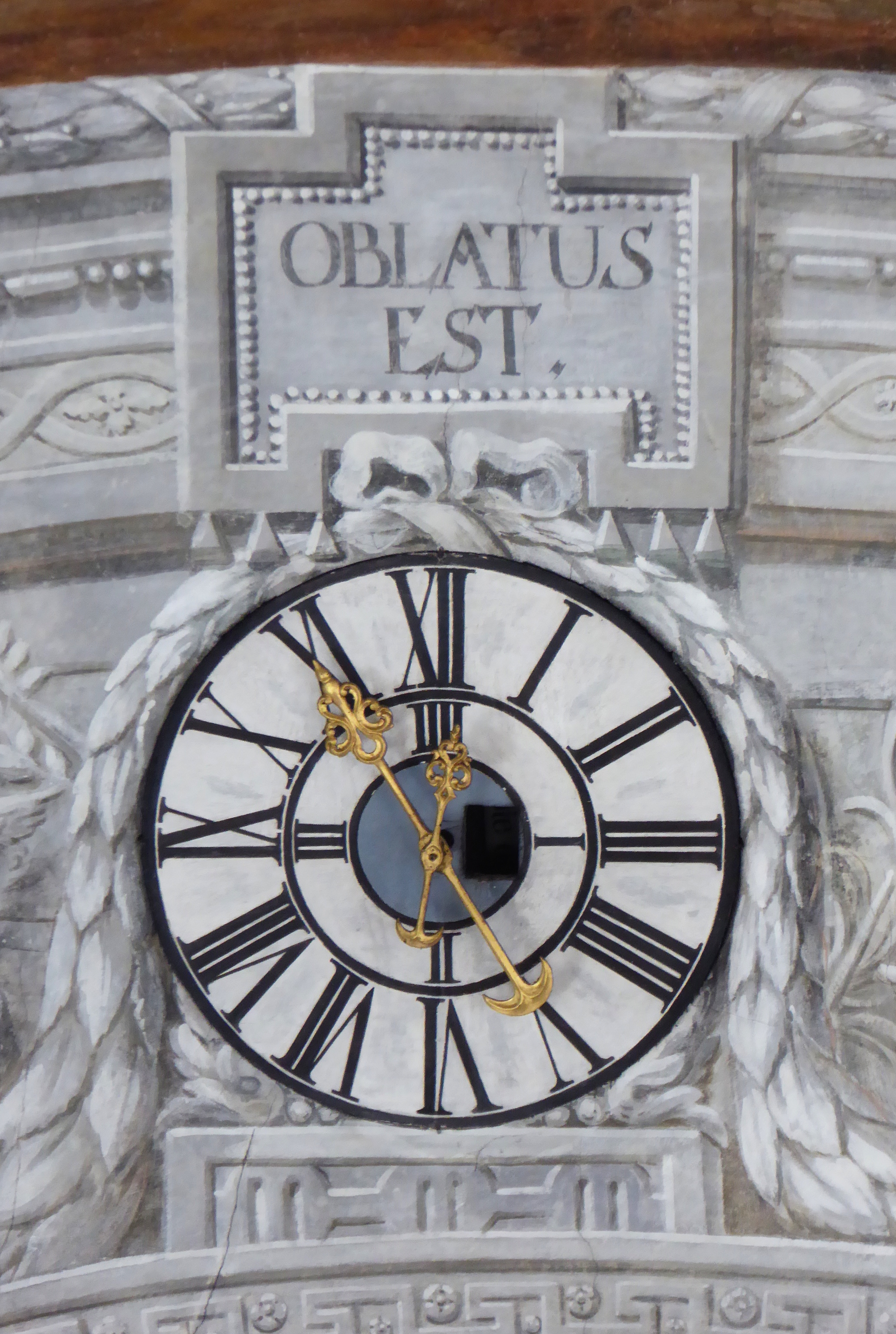 Boarisch: Seehausen am Staffesä, d' Michaelskirch; sie hat innan drin a Uhr iwam Altar. De lateinische Schrift „oblatus est“ hoaßt sovui wia „er is g'opfert worn“.